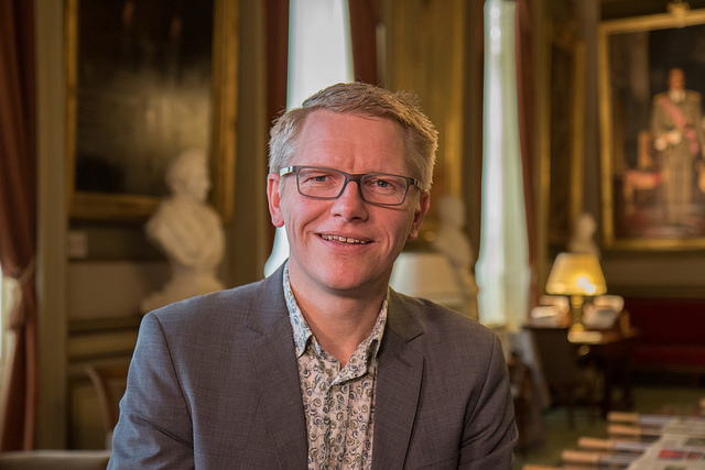 Georges Gilkinet, Député fédéral Ecolo